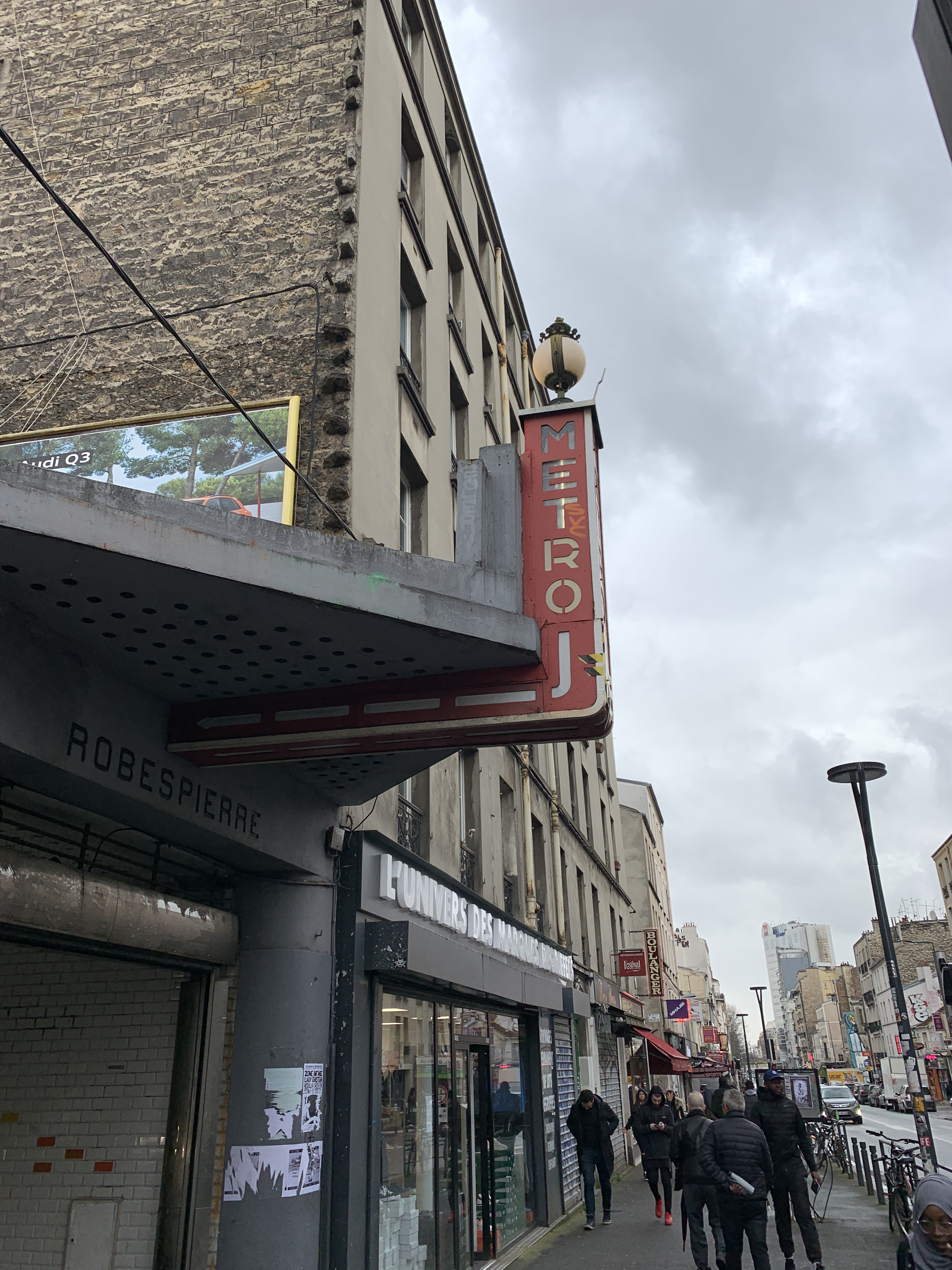 Entrée de la station de métro Robespierre, Montreuil, Seine-Saint-Denis.